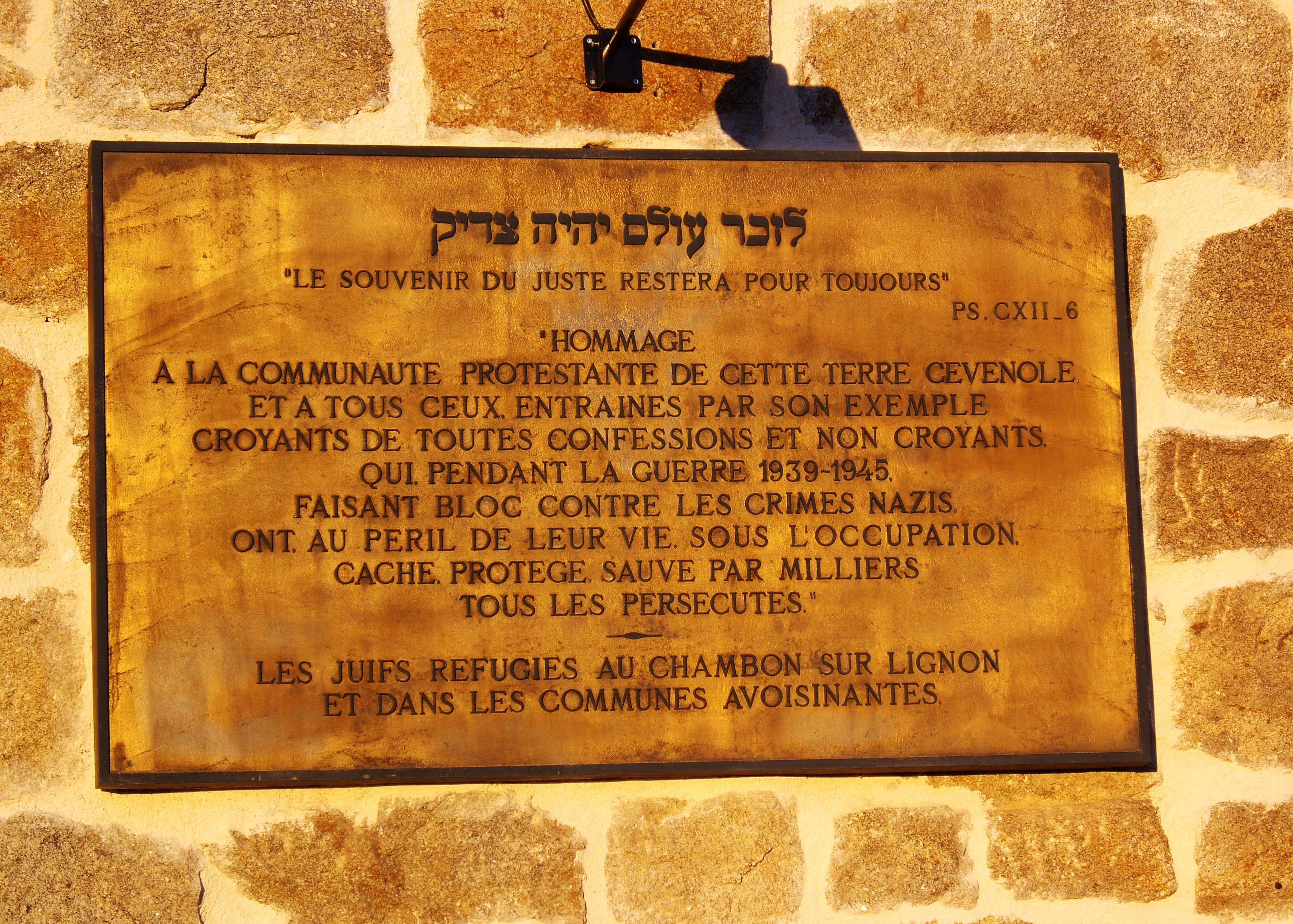 This plaque is affixed on the village school of Le Chambon sur Lignon and recalls the solidarity attitude of the whole population towards Jews during their WWII persecution, allowing several thousands of lives to be saved.